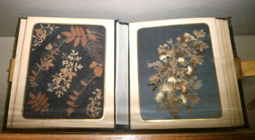 Музей: Гродзенскі дзяржаўны гісторыка-археалагічны музей Тып: рэчавыя помнікі Від: прадметы побыту Прадметнае імя: альбом - гербарый Аўтары: Ажэшка Эліза; Матэрыялы: кардон; аксаміт; калька; тканіна шаўковая; латунь; каленкор; Тэхналогіі стварэння: вытворчасць ручная; клеенне; Дата стварэння: канец ХІХ - пачатак ХХ стст. Месца стварэння: Расійская імперыя, Гродна Памеры: 36 х 28 х 9 см